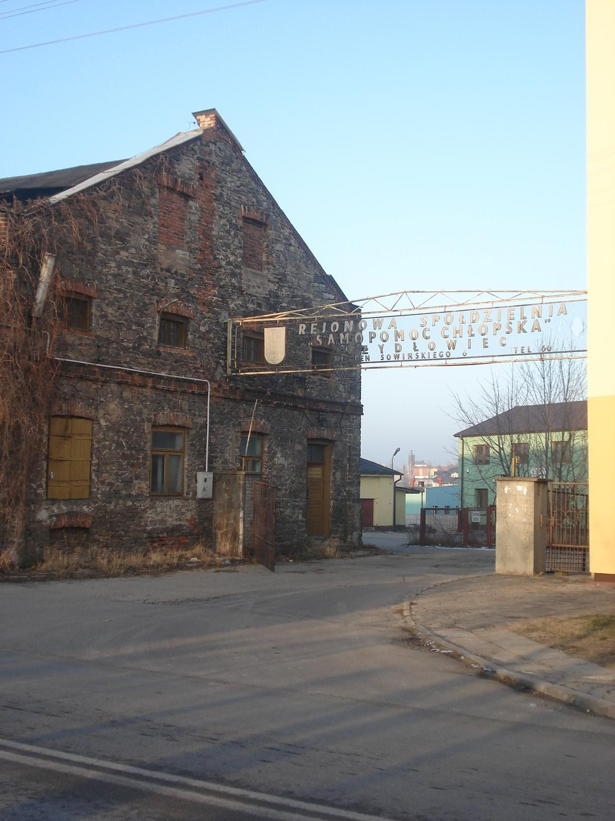 Szydłowiec - zabudowania w dawnym browarze Stumpfów